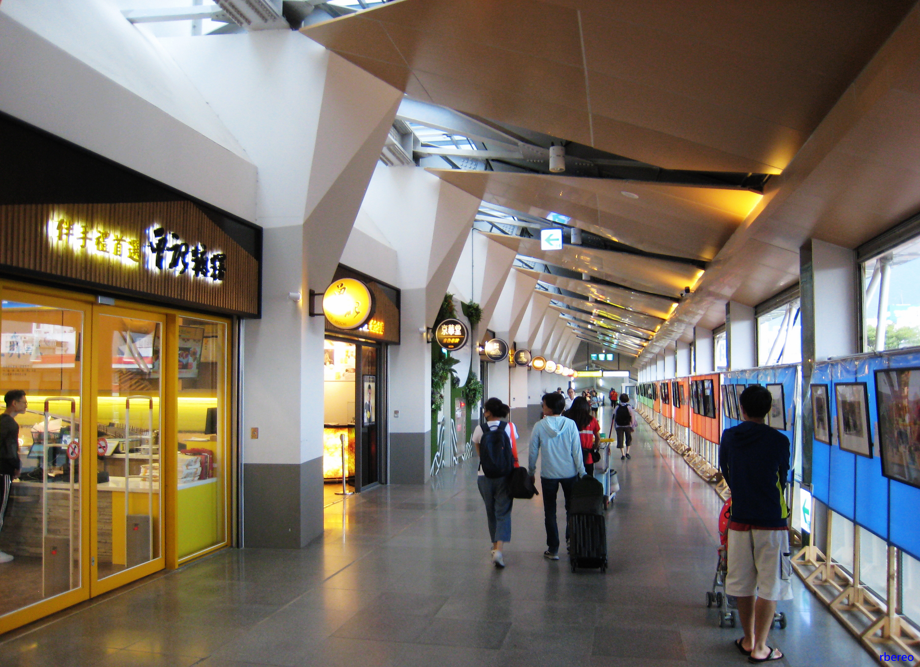 108年10月花蓮車站3樓自由通道